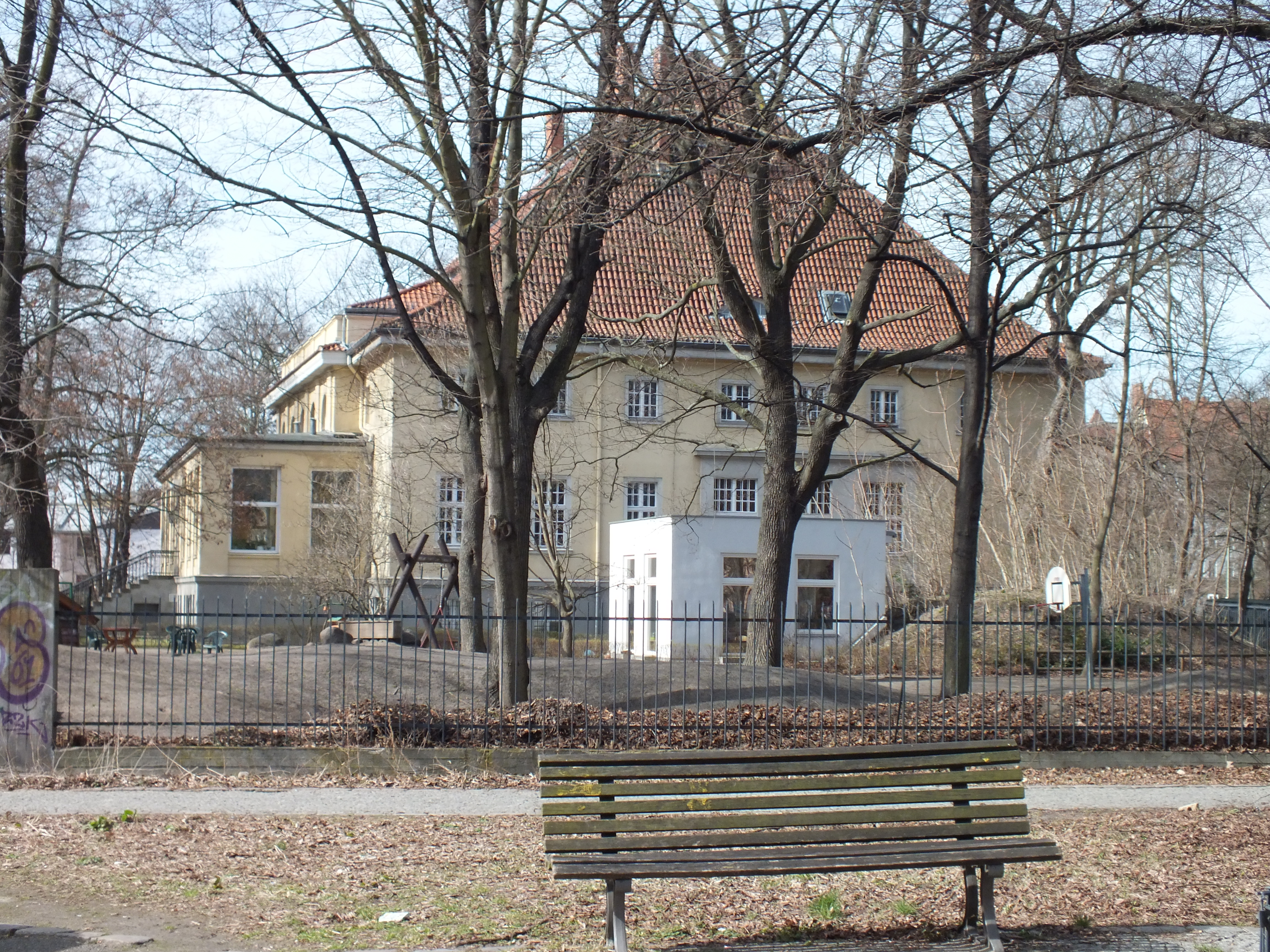 Fontanepromenade in Kreuzberg: Blick von den Grünanlagen in Straßenmitte zur Urbanstraße, hier mit dem denkmalgeschützten "Offizierskasino".